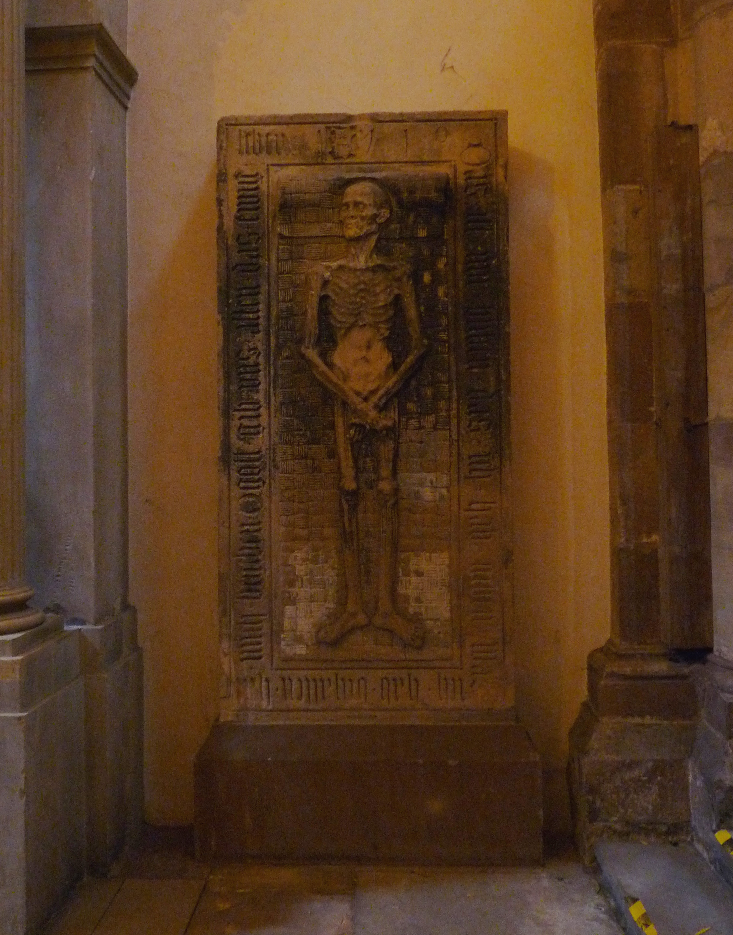 Transi du mécène Nicolas Roeder (mort en 1510) à l'église Saint-Thomas de Strasbourg